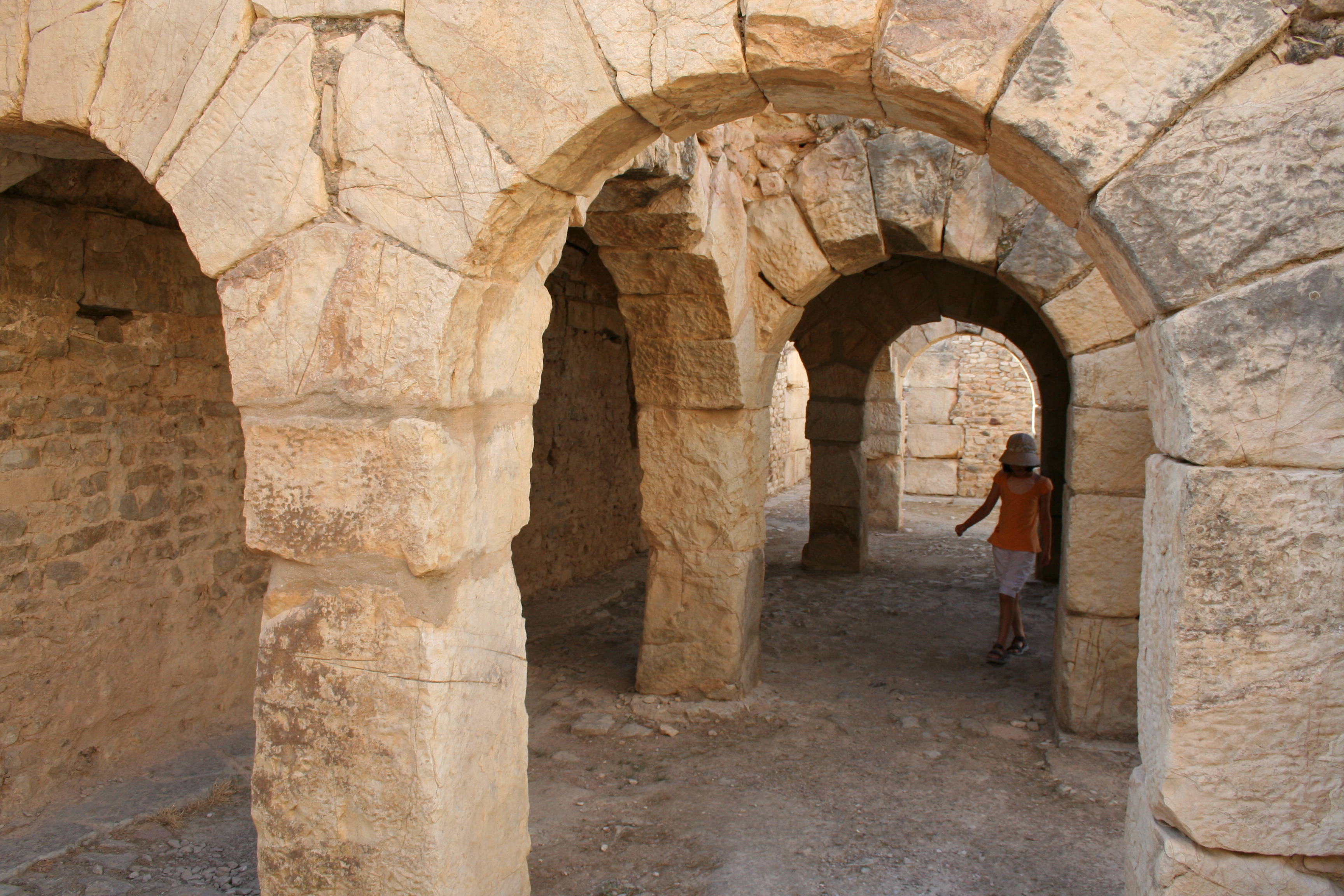 Rez de chaussée thermes de Julia Memmia, Bulla Regia, Tunisie